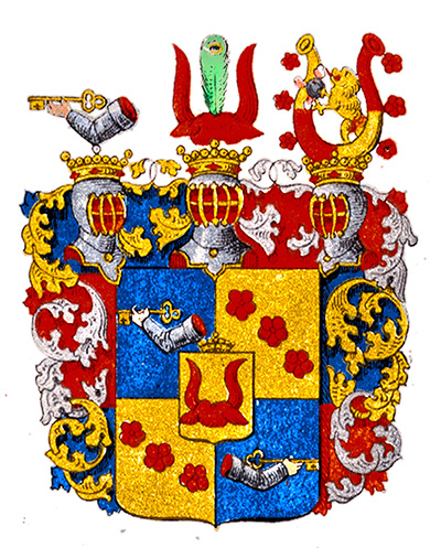 герб графов Оксенштерна из дома Корсхолм и Ваза